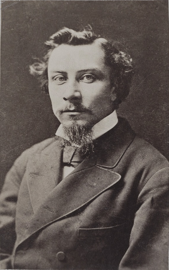 Henryk Siemiradzki